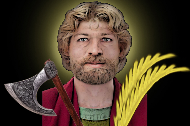 Rostro de San Magnus (aspecto que se le atribuye tras la reconstrucción a partir de sus restos , acompañado de la palma del martirio y del hacha, símbolo de su realeza y su procedencia nórdica